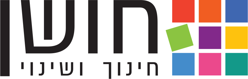 לוגו חוש"ן 2018